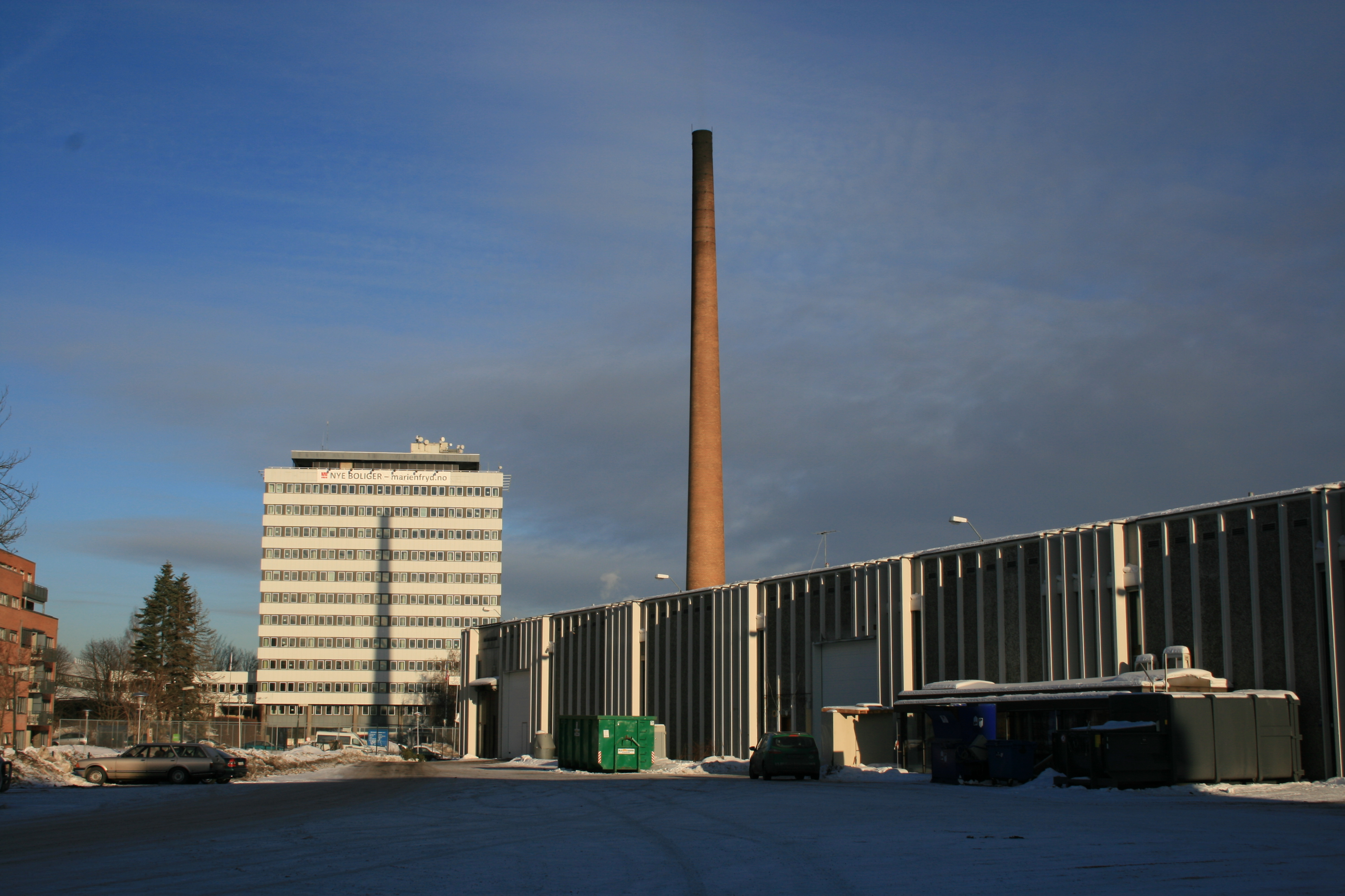 Pipa og deler av fabrikksanlegget til Tiedemanns Tobakk på Hasle. I bakgrunnen ser man det gamle hovedkontoret til Narvesen.